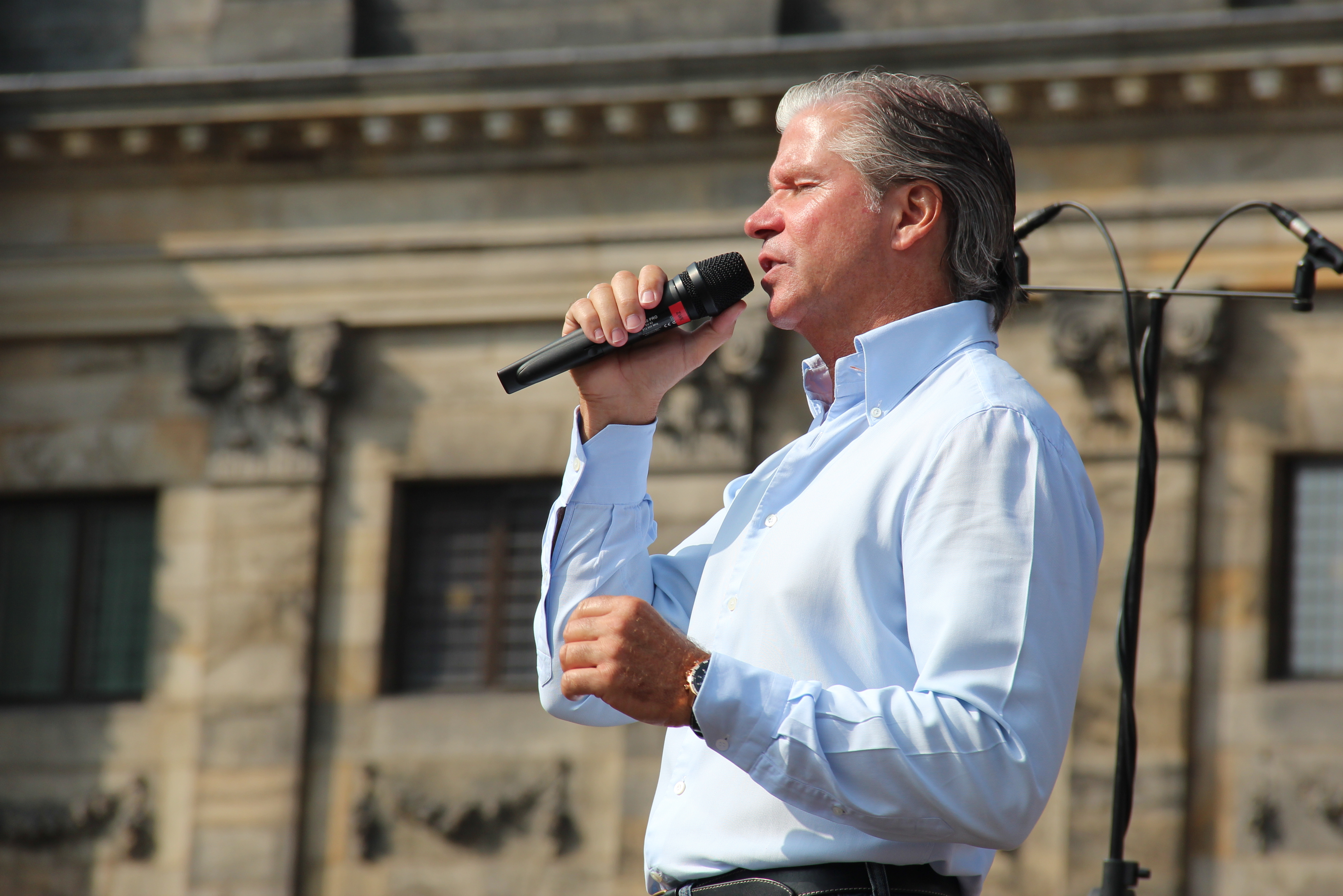 Dries Roelvink tijdens het Draaiorgel Festival Amsterdam 2012